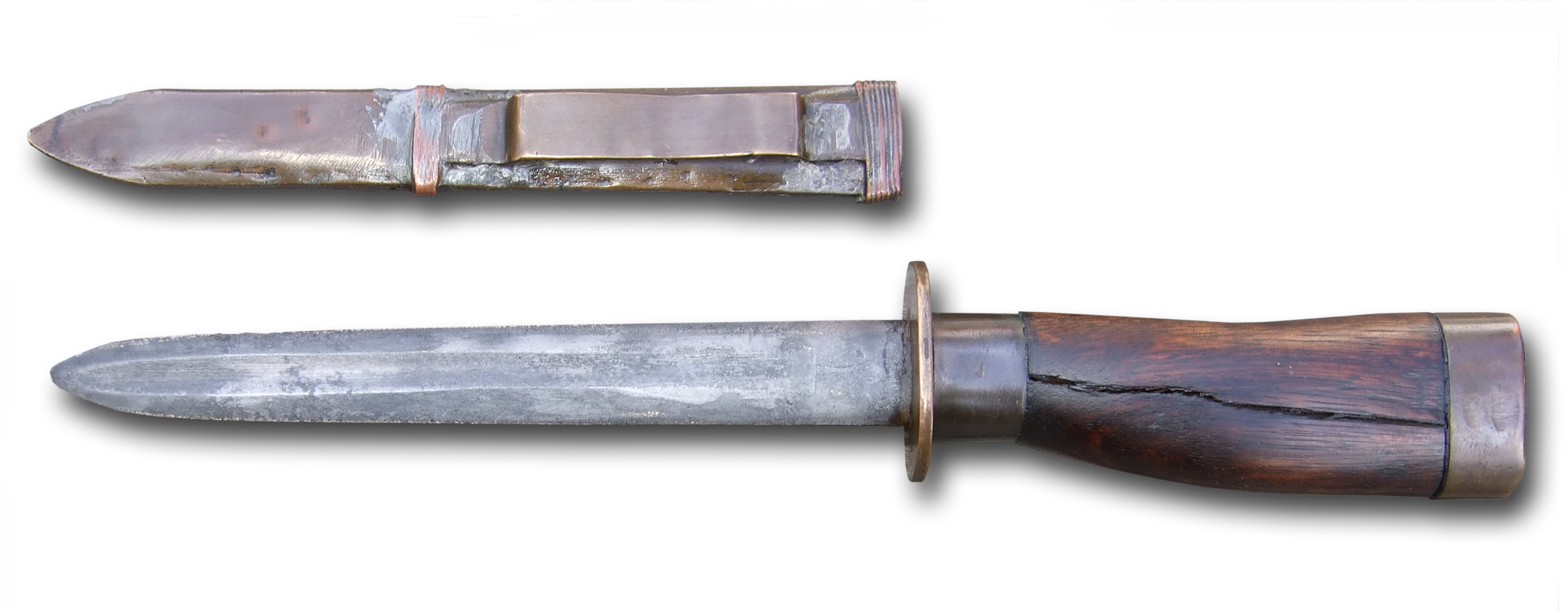 Grabendolch Grabenarbeit